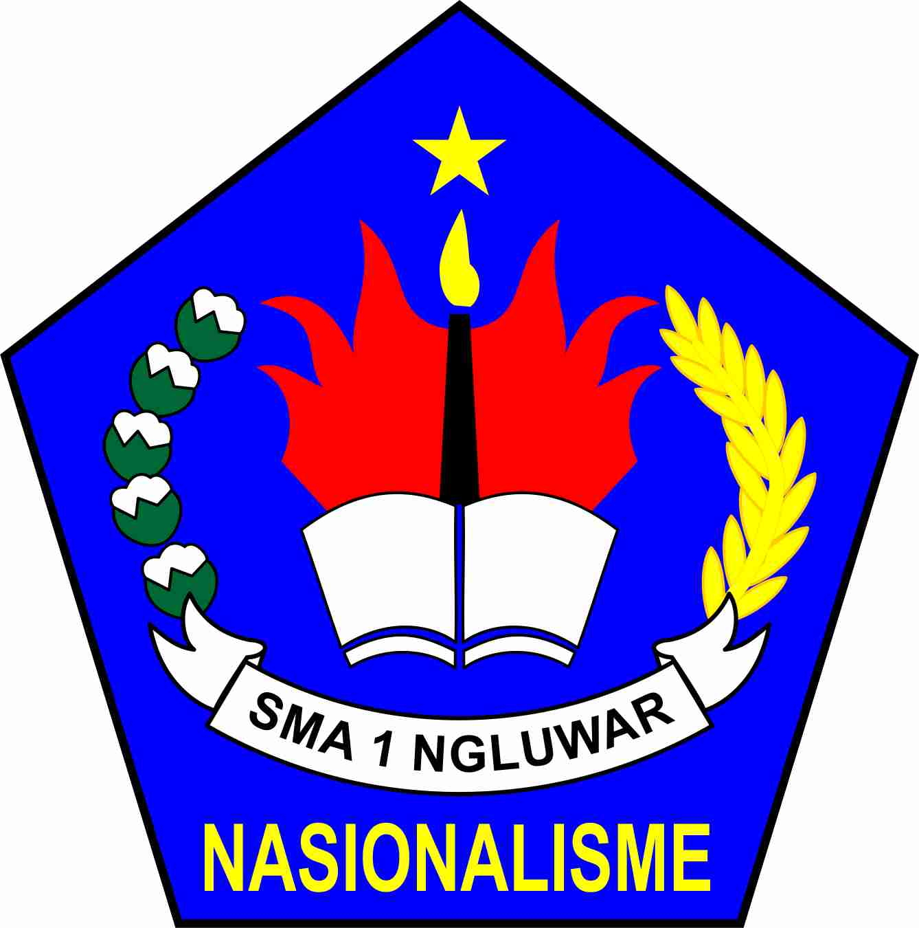 logo SMA Negeri 1 Ngluwar